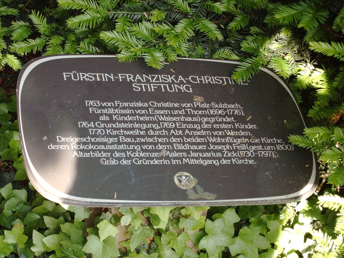 Fürstin-Franziska-Christiane-Stiftung Tafel vor dem Haupteingang Aufgenommen durch Schumir am 26. Juli 2005 GNU FDL